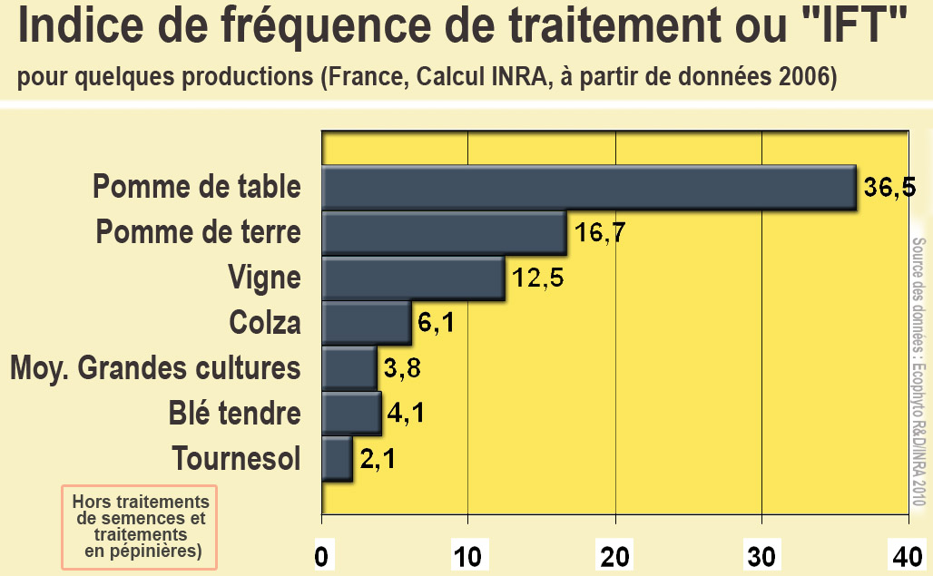 D'après données INRA elles mêmes utilisant des données de 2006 collectées par le ministère de l'agriculture et publiées en 2010 (Ecophyto R&D) Indicateur de niveau d'utilisation des pesticides : l'IFT, qui est un indicateur de fréquence de traitement). Il correspond dans le calcul de l'INRA à la " Somme des traitements appliqués, pondérés chacun par le rapport entre la dose/ha et la dose d'homologation. Il est calculé à partir des enregistrements des traitements effectués à la parcelle, et des doses homologuées répertoriées dans la base de données e-phy du ministère en charge de l’agriculture".